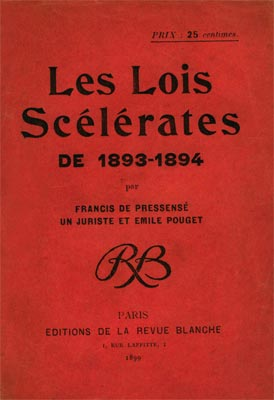 Francis de Pressensé et Émile Pouget - Les Lois Scélérates de 1893-1894 - Editions de "La Revue Blanche" 1899